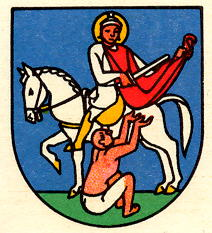 Wappen von Saint-Martin, Wallis